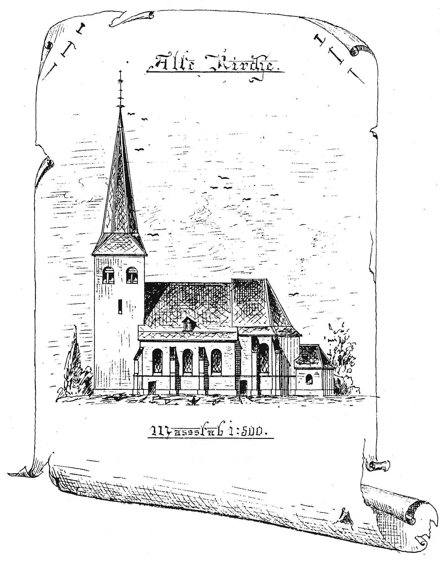 Die Zeichnung stammt aus dem Jahr 1894 und ist vom Architekten Anton Becker aus Bonn. Das Original befindet sich im Pfarrarchiv Mutscheid.